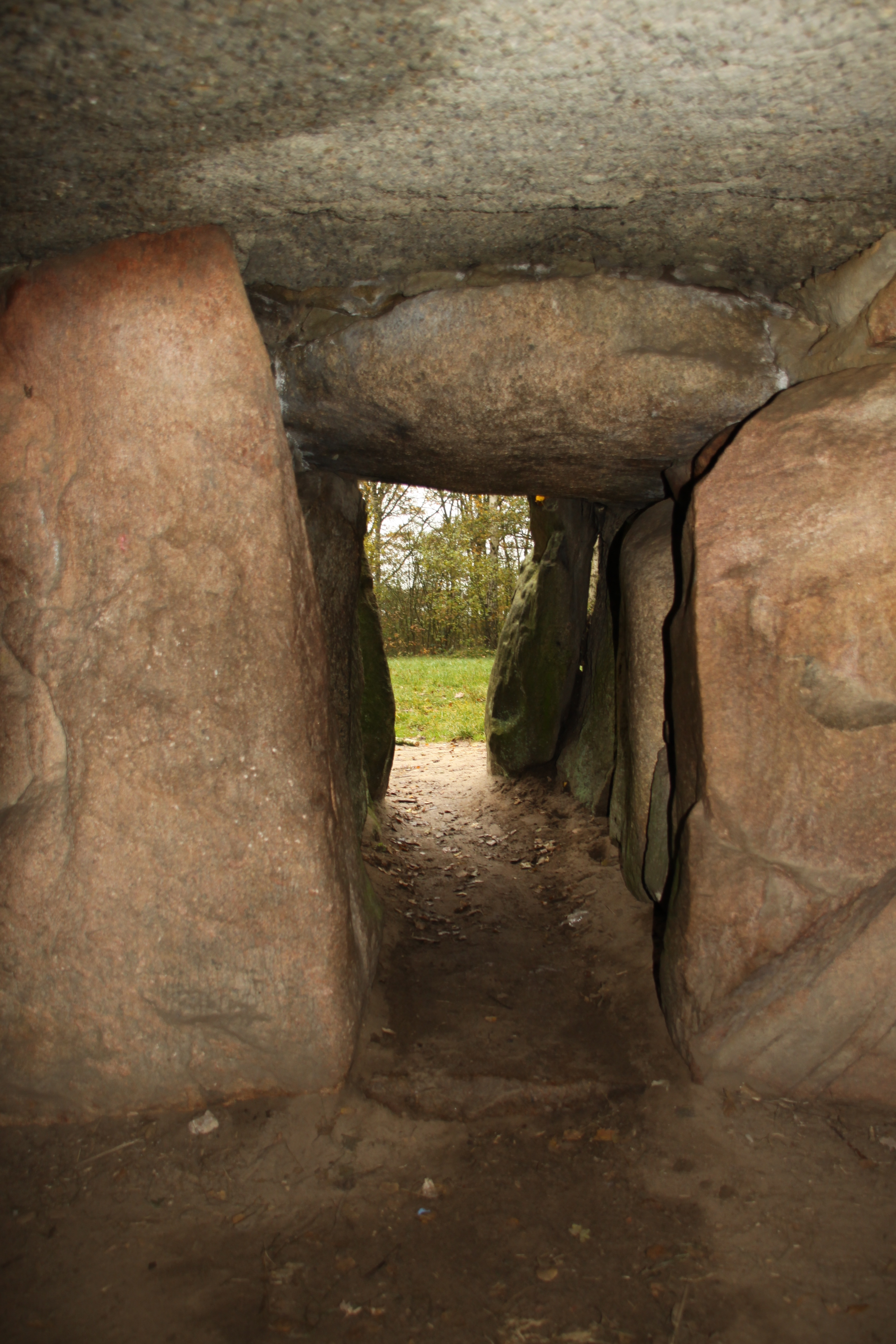 Eingang zum Steingrab in Kleinenkneten.